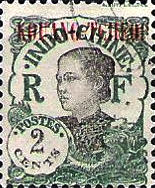 Timbre France Indochine, 2c, surchargé Kouang-Tchéou-Wan (ex-Fort Bayard maintenant Zhanjiang/R.P.Chine)